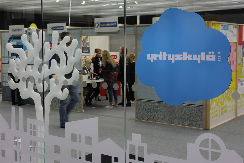 Yrityskylää Kuopion Leväsen kaupunginosassa, Kauppapaikka Hermannissa. Yrityskylä on suomalainen koulutusinnovaatio, jossa peruskoulun kuudes- tai yhdeksäsluokkalaisille tarjotaan yhteiskunnan, työelämän ja yrittäjyyden opintokokonaisuus. Osana koulutusta oppilas työskentelee jossakin ammatissa sekä harjoittelee toimintaa kuluttajana ja kansalaisena yrityskylän tarjoamien palvelujen välityksellä. Koulutus parantaa koululaisten talousosaamista ja ymmärrystä yhteiskunnan toiminnasta.